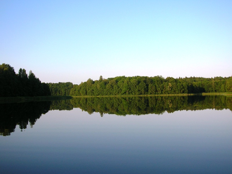 Duburys. Zarasų raj.